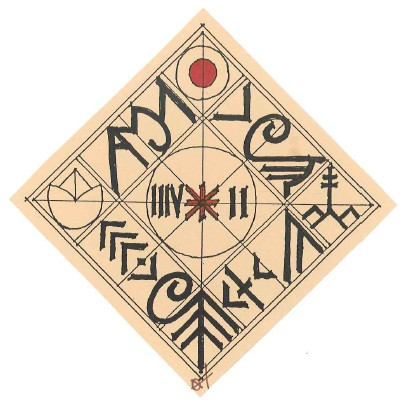 Élő Rovás Tanácskozás (Gödöllő, 2008.10.04) emblémája. Tervezte: Dittler Ferenc. A felirat székely-magyar rovással készült.